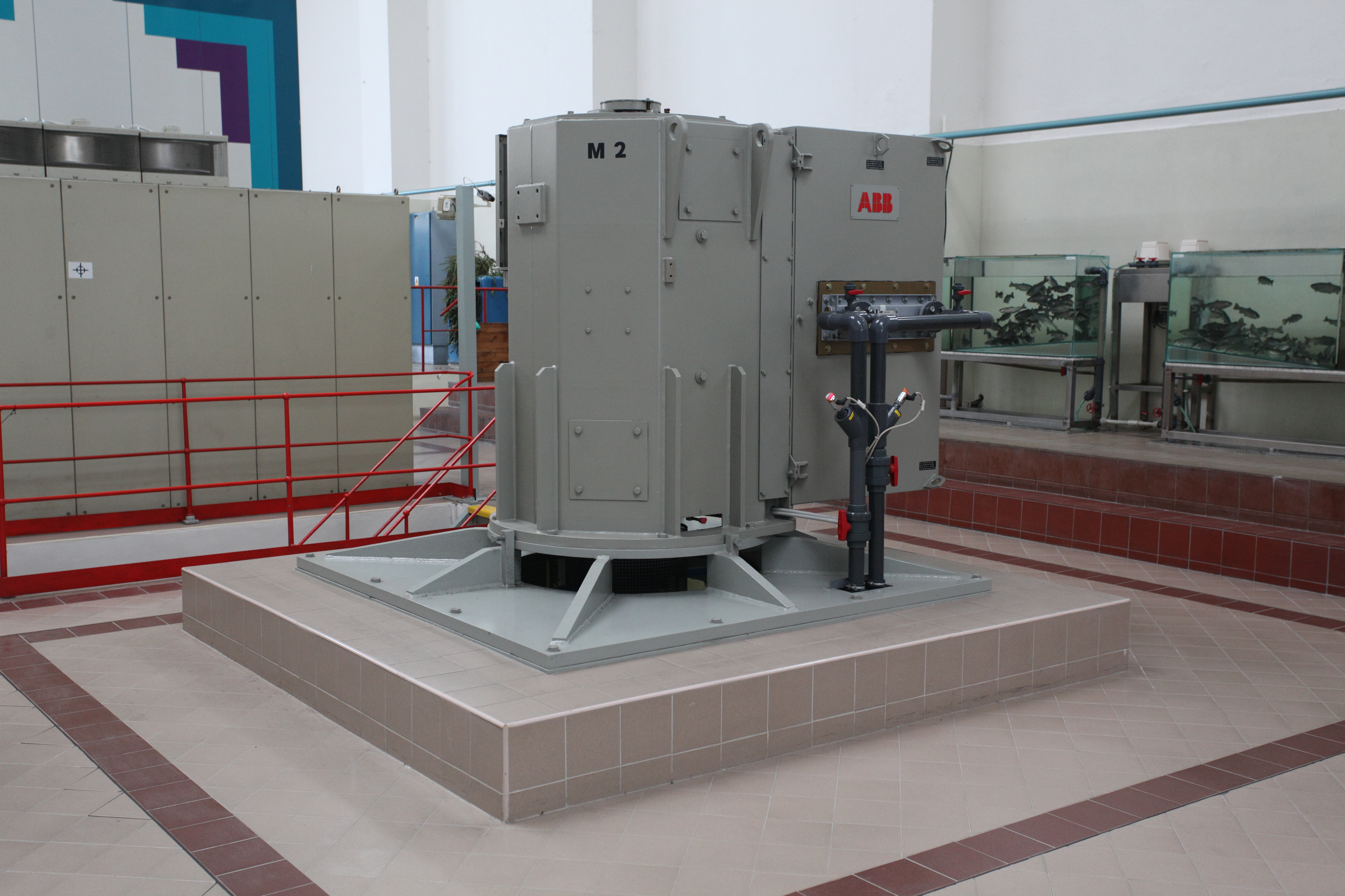 Nízkoenergetické výtlačné čerpadlo v hlavní čerpací stanici v Káraném. Voda vytlačovaná do řadů I., II. a III. ve směru na Prahu (doba transportu 1 den) je voda ochlorovaná smíchaná z vod z přírodní a umělé infiltrace (=nasycování půdního profilu vodou – děje se buď přirozenou cestou (z břehu, dna vodního toku, deštěm) a umělým napouštěním a zasakováním do půdního profilu) a z vod artéských (= podzemní voda pod hydrostatickým tlakem v pórech pískovců, překrytá nepropustnou vrstvou). Označení artéská voda pochází z francouzské provincie Artois, kde byla obdobná voda čerpána mnichy kartuziánského řádu ve 12. století. Zdroje: Křivánek, Oldřich a Kněžek, Miroslav. 2001. Zdroje pitné vody v Káraném. Principy získávání vody v oblasti káranské vodárny. Pražské vodovody a kanalizace a.s. Wikipedie